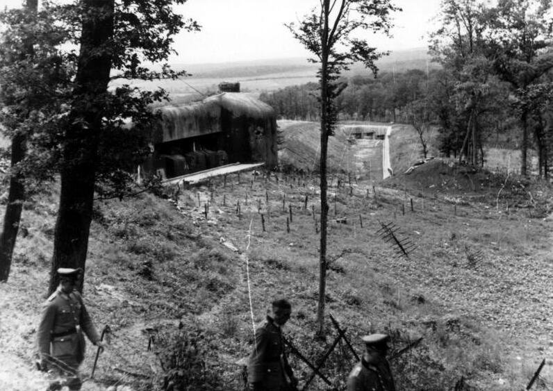 Westwall, Maginot-Linie